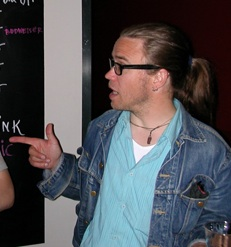 Skivbolagsdirektören, läraren, kommunpolitikern och ornitologen Joakim "Jocke" Wallström.